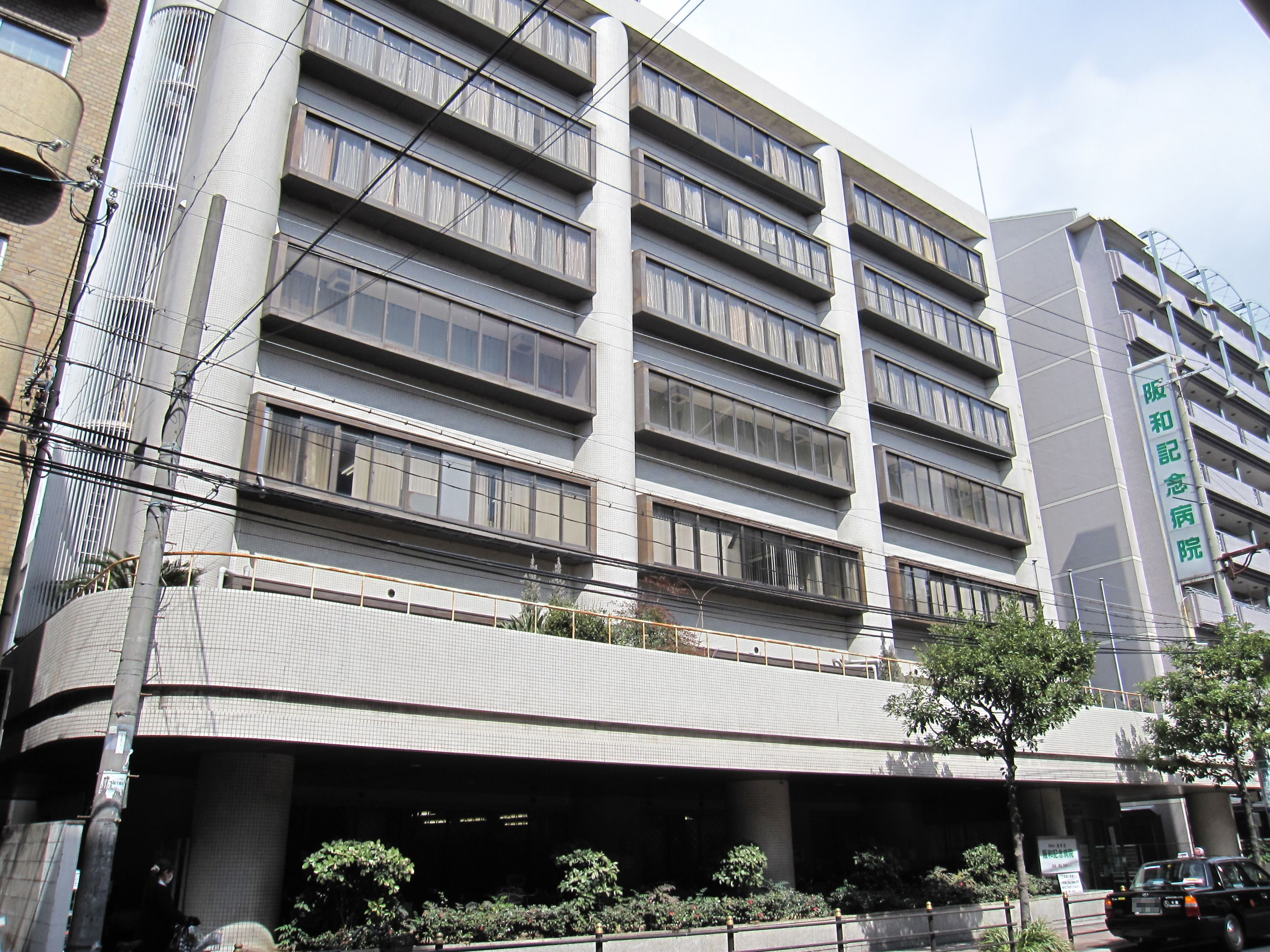 阪和記念病院